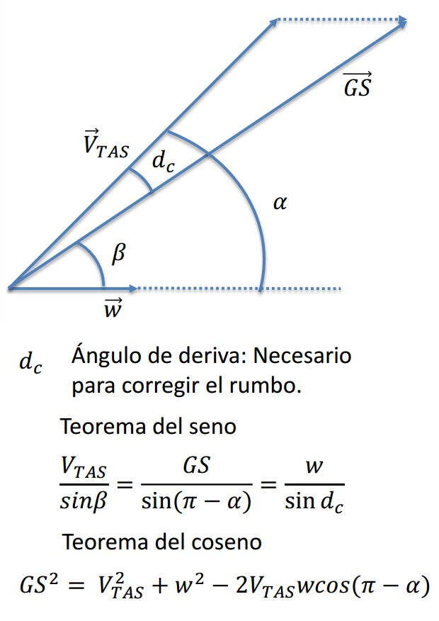 Diagrama vectorial del triangulo de vientos.